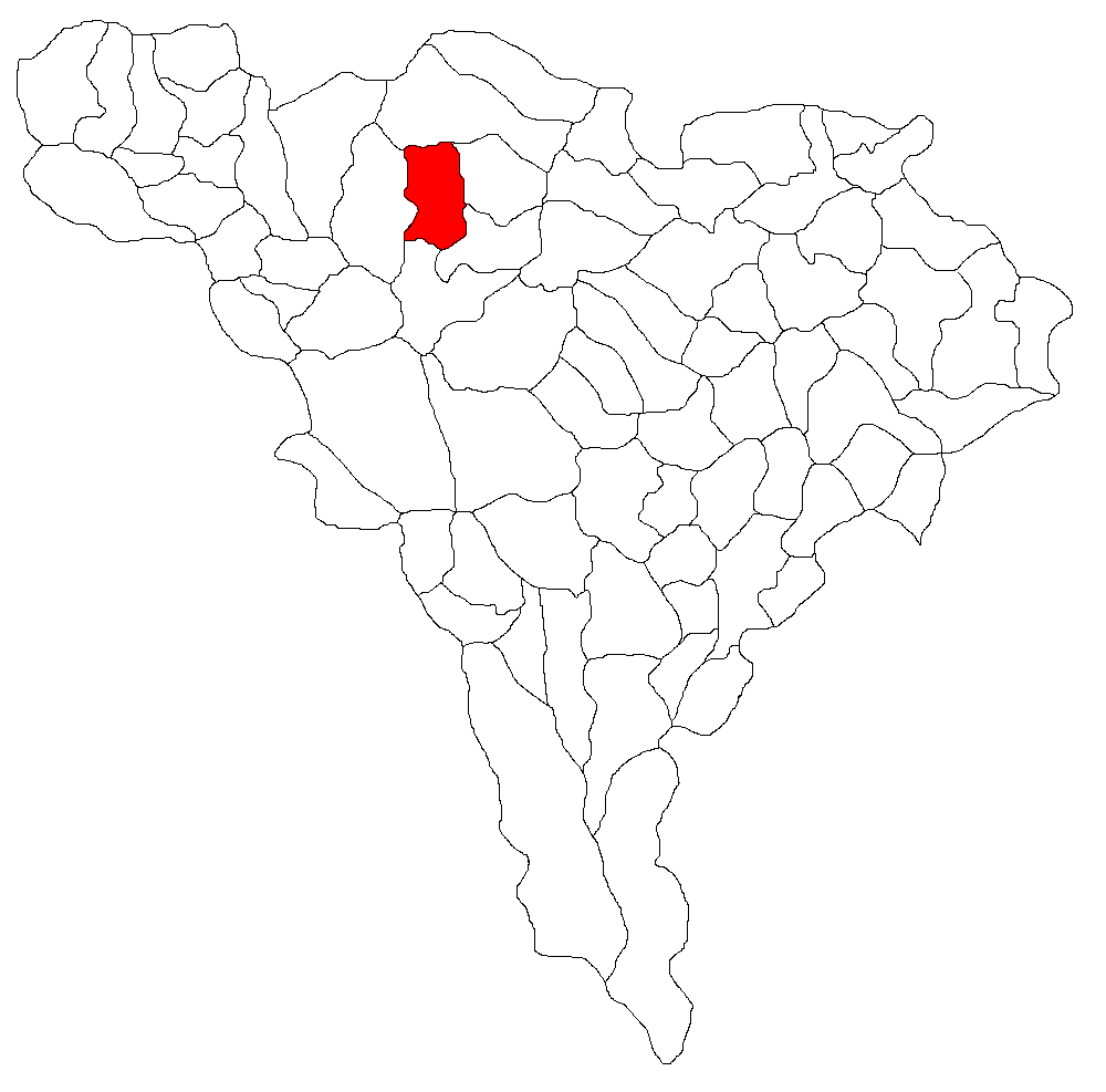 Categorie:Hărţi ale judeţului Alba